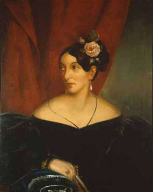 Bildnis Julie Gley Rettich (1809-1866), Wien 1836, Öl auf Leinwand, 79 x 63 cm; Theaterwissenschaftliche Sammlung der Universität zu Köln, Schloss Wahn, Inv. Nr. 41155